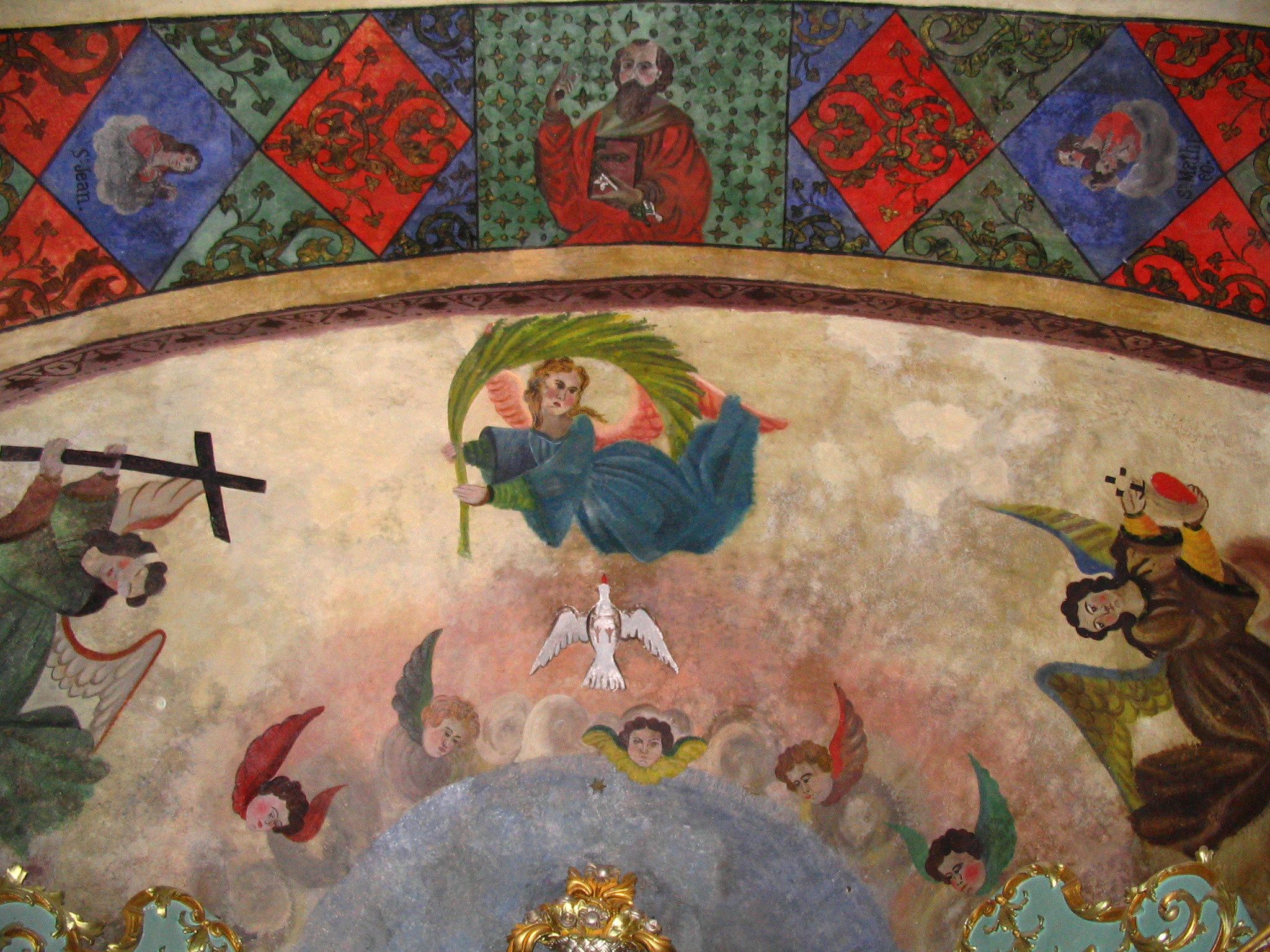 Village de Castet - Fresque du choeur de l'église - Pyrénées Atlantiques - France